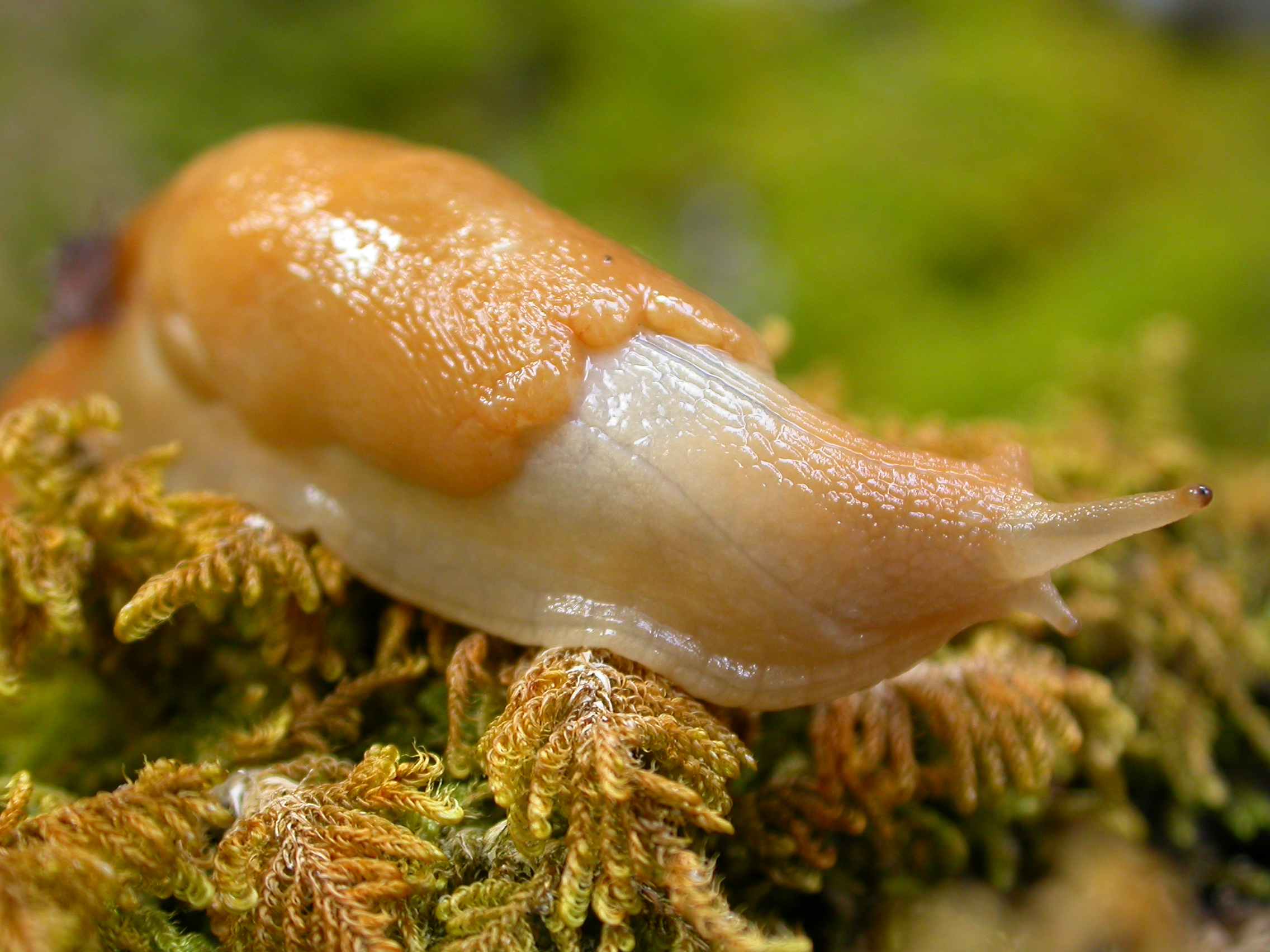 عکاس کاربر:ahmadahmadf یک گونه حلزون بدون صدف